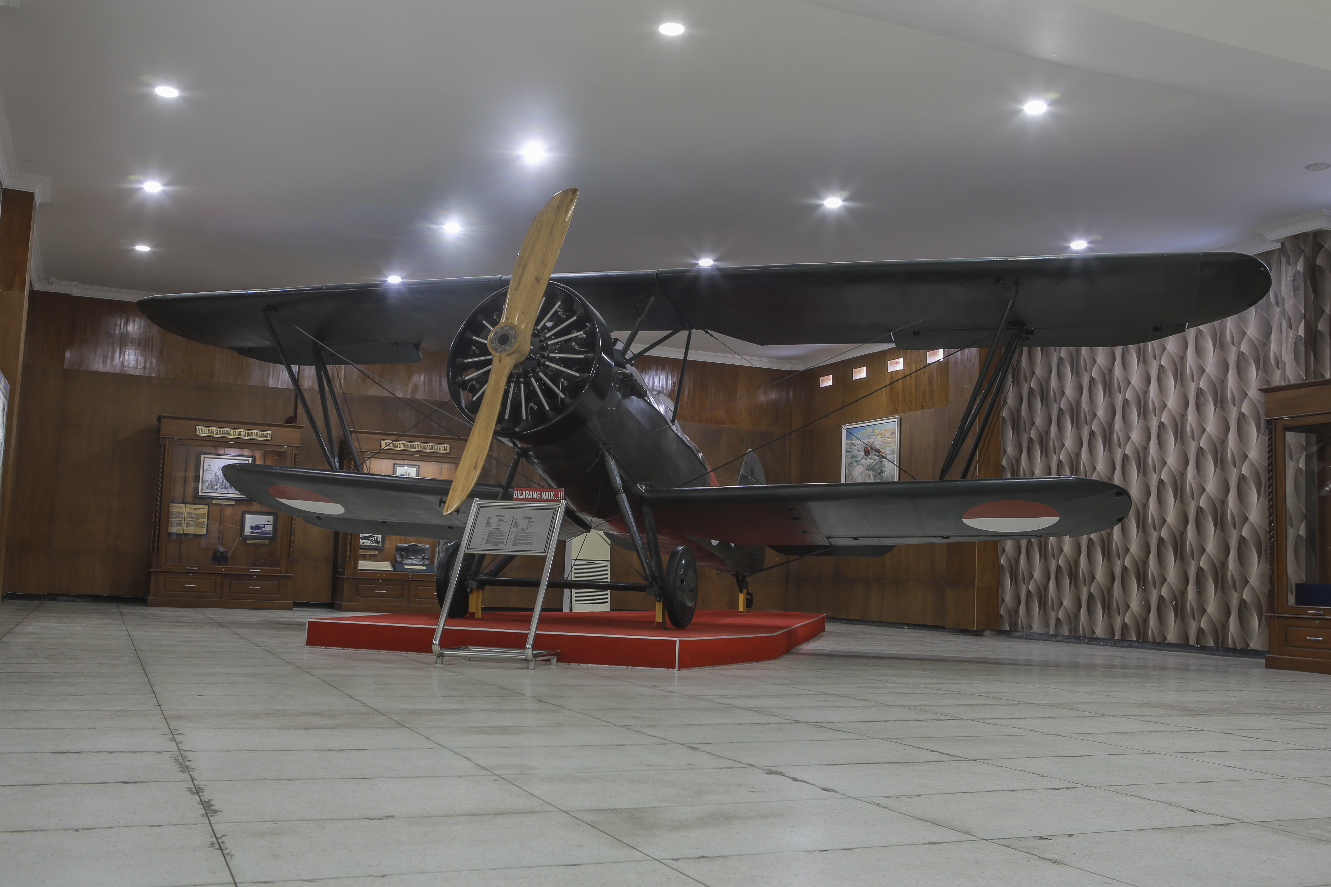 Pesawat Cureng TNI AU